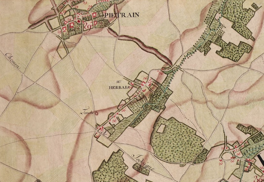 Extrait de la carte de Ferraris n° 133A